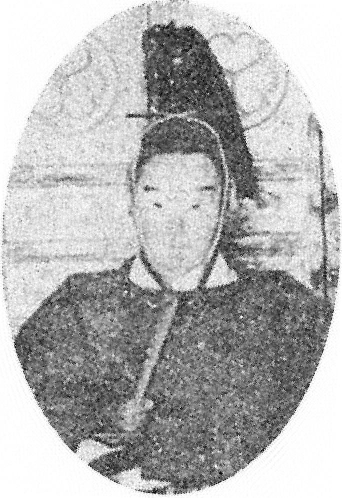 徳川斉荘の木像の写真(長栄寺旧蔵、木像は戦禍により焼失。戦前に撮影)。